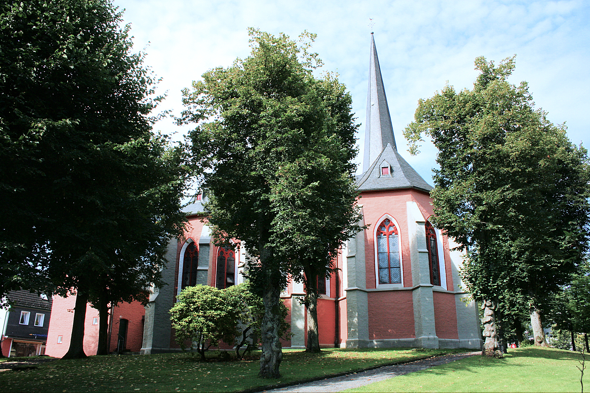 Much, Kirche St. Martin